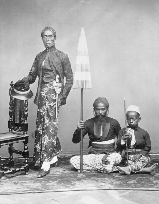 Foto. Portret van een Javaanse vorst of notabele met twee bedienden